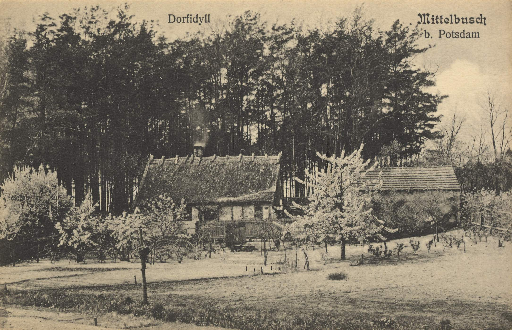 Dorfidyll